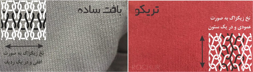 تفاوت تریکو و بافت ساده